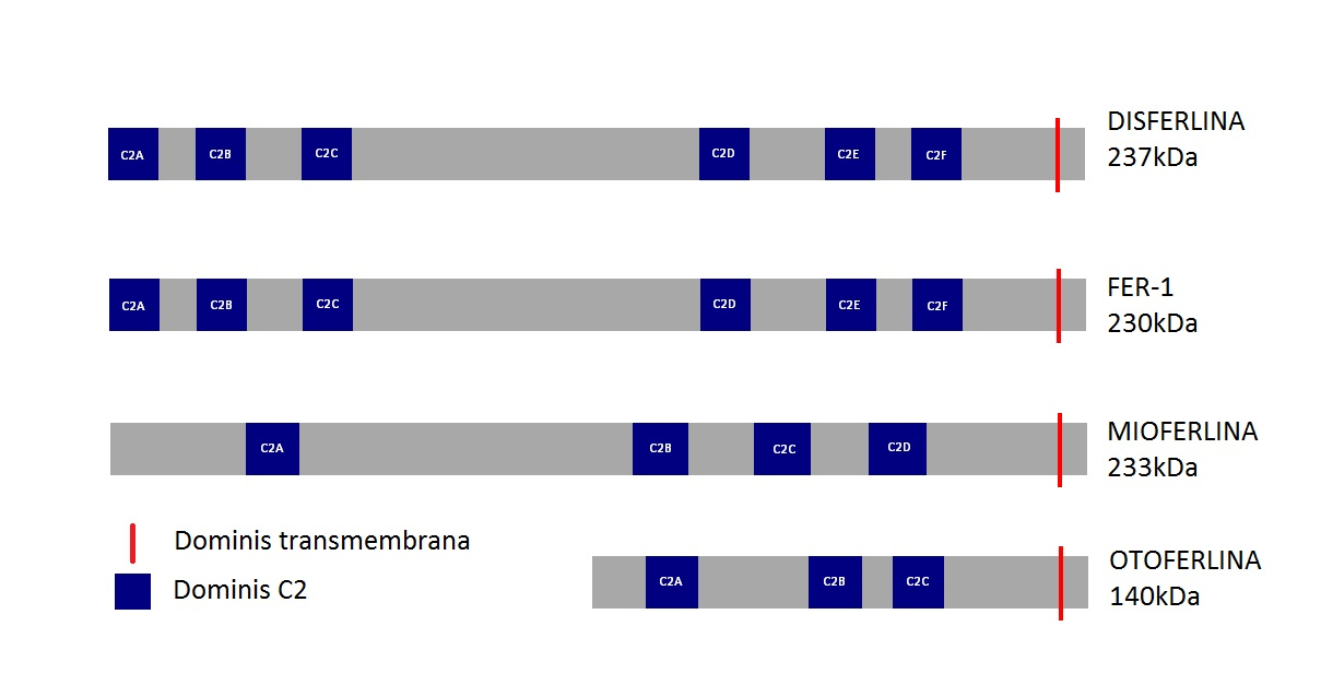 Descripció de la família de les ferlines on s'observen els dominis C2